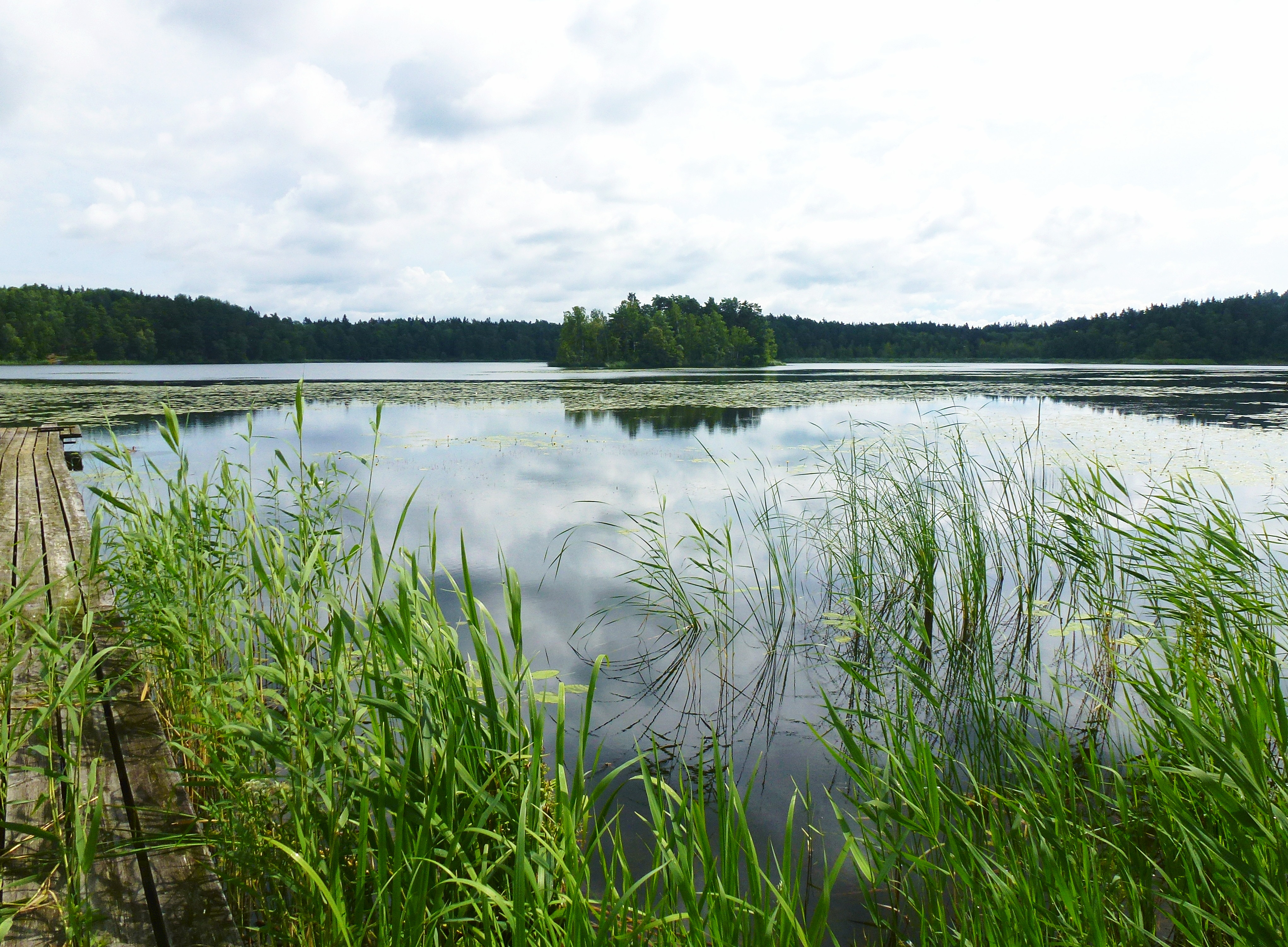 Översjön med ön Getholmen sedd från Molnsätra gård